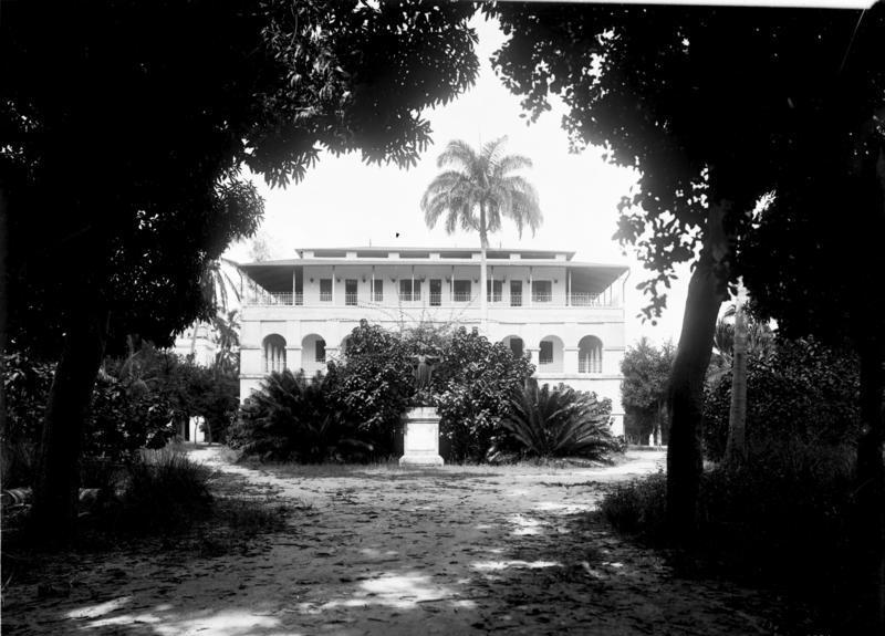 Bagamojo, Kath. Mission